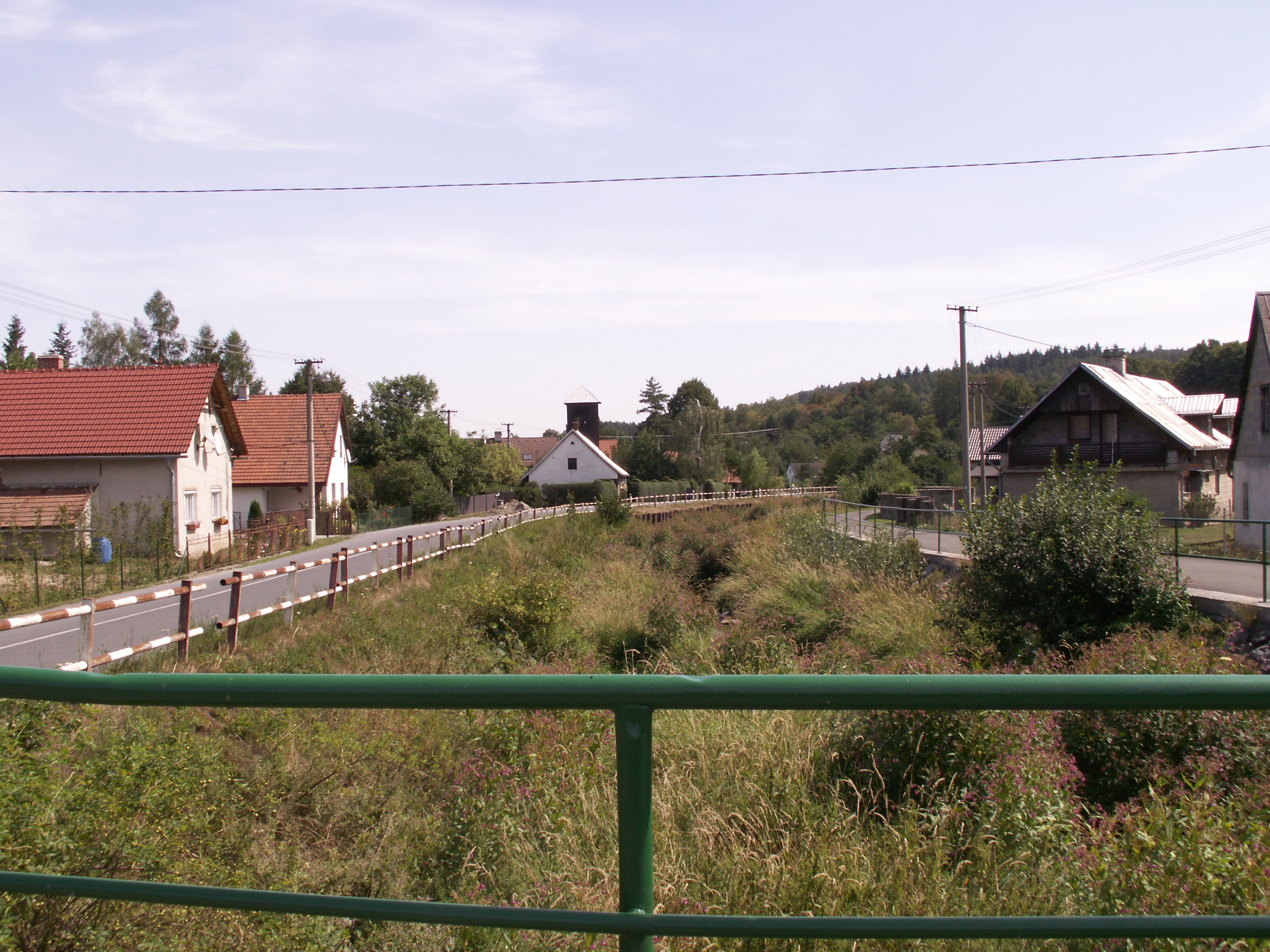 Arnultovice, východní část obce Jindřichov, okres Bruntál, kraj Moravskoslezský